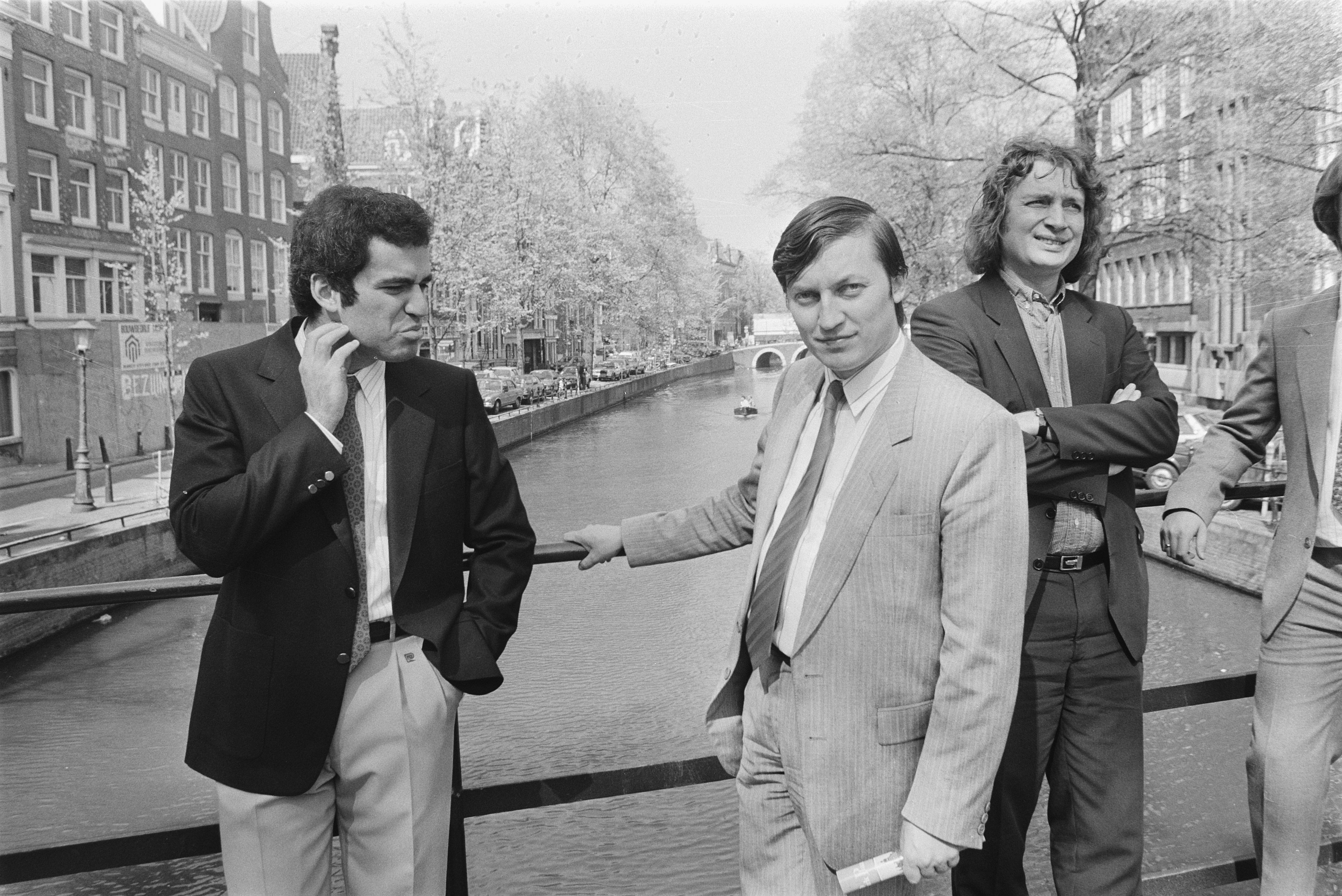 Collectie / Archief : Fotocollectie Anefo Reportage / Serie : [ onbekend ] Beschrijving : Schakers Kasparov, Karpov en Timman (v.l.n.r.) op OZ Voorburgwal bij bezoek aan Amsterdam Datum : 28 april 1987 Locatie : Amsterdam, Noord-Holland Trefwoorden : schaken, sport Persoonsnaam : Karpov Anatoli, Kasparov Garri, Timman, Jan Fotograaf : Molendijk, Bart / Anefo Auteursrechthebbende : Nationaal Archief Materiaalsoort : Negatief (zwart/wit) Nummer archiefinventaris : bekijk toegang 2.24.01.05 Bestanddeelnummer : 933-9647